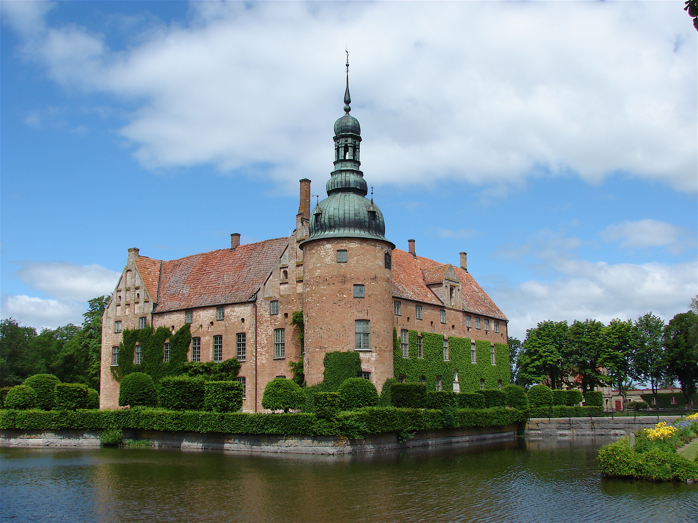 Vittskövle, Vitskøl, Hvidskøvle